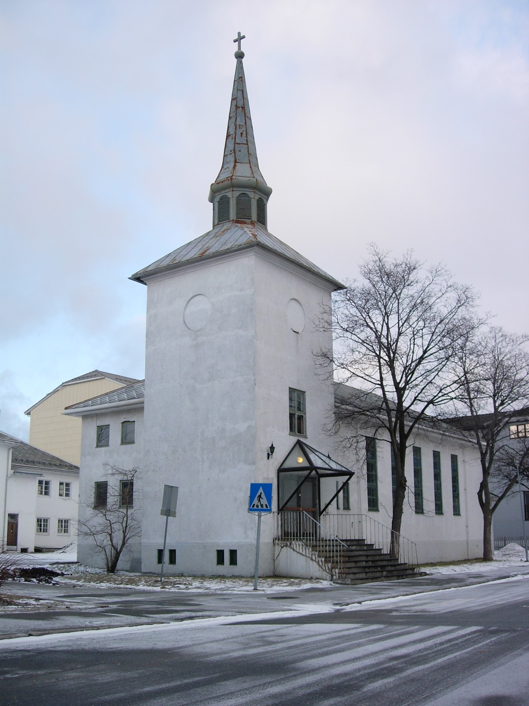 Bodø Methodist Church / Metodistkirken i Bodø (demolished june 2006)